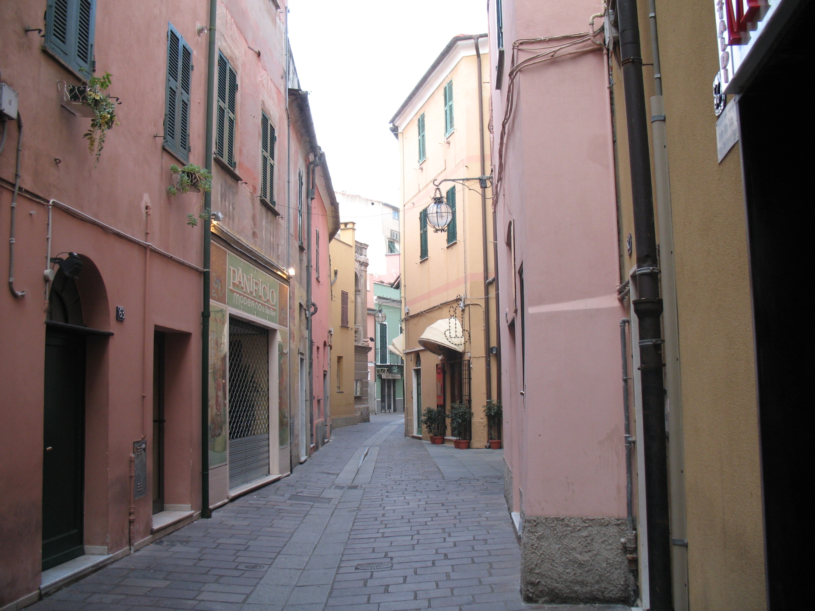 Serie di Immagini da Spotorno in provincia di Savona - Il cuore del centro storico ruota attorno alla piazza Aonzo e alla adiacente via De Maestri